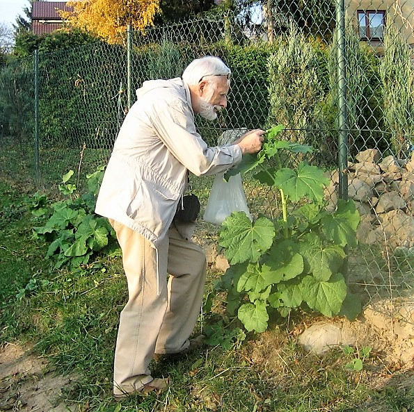 2011 Kliny Kraków poszukiwanie skoczogonków na malwach